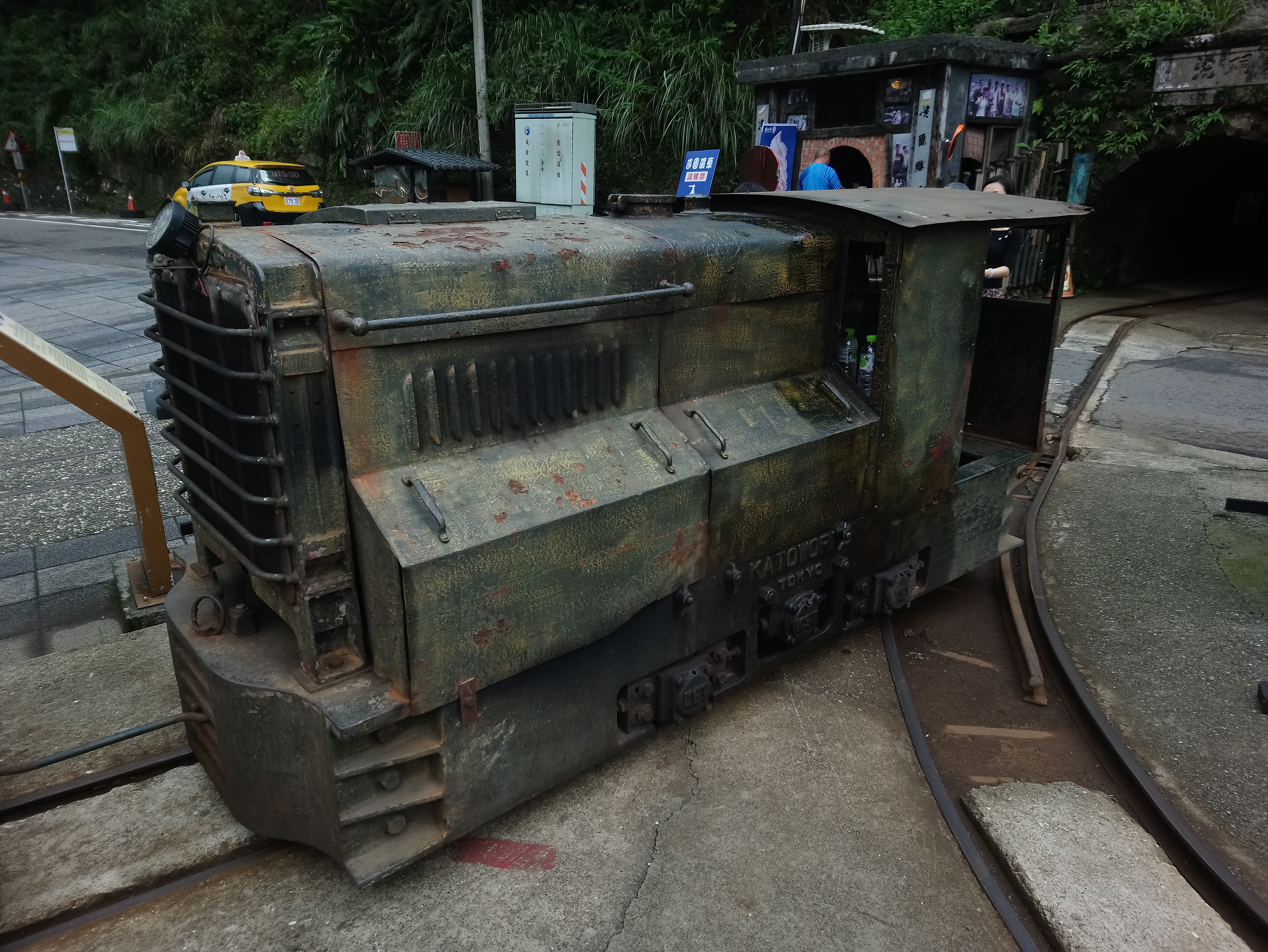 瑞三煤礦加藤柴油機車,新北市瑞芳區猴硐地區猴硐里